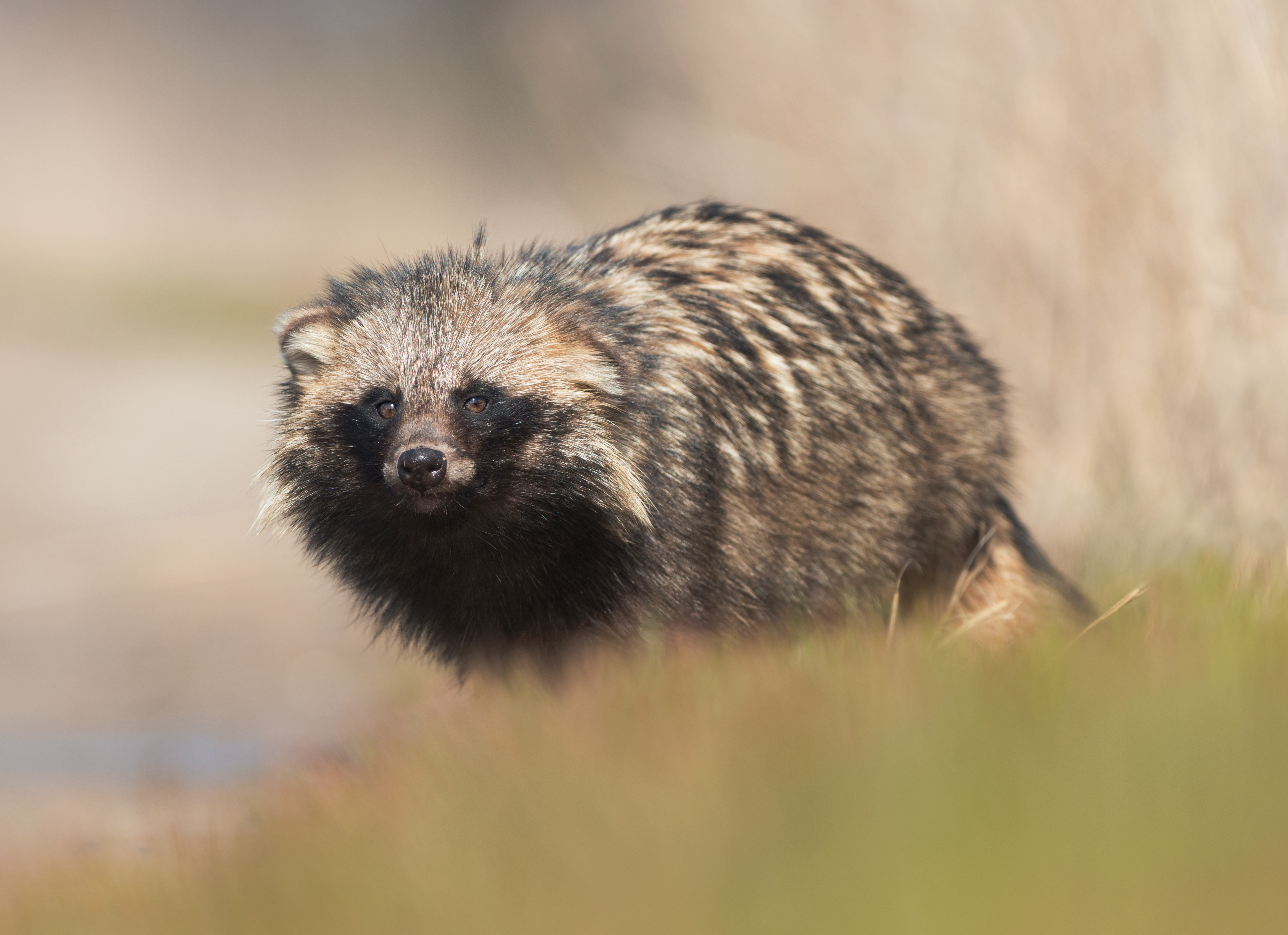 Кінбурнська коса